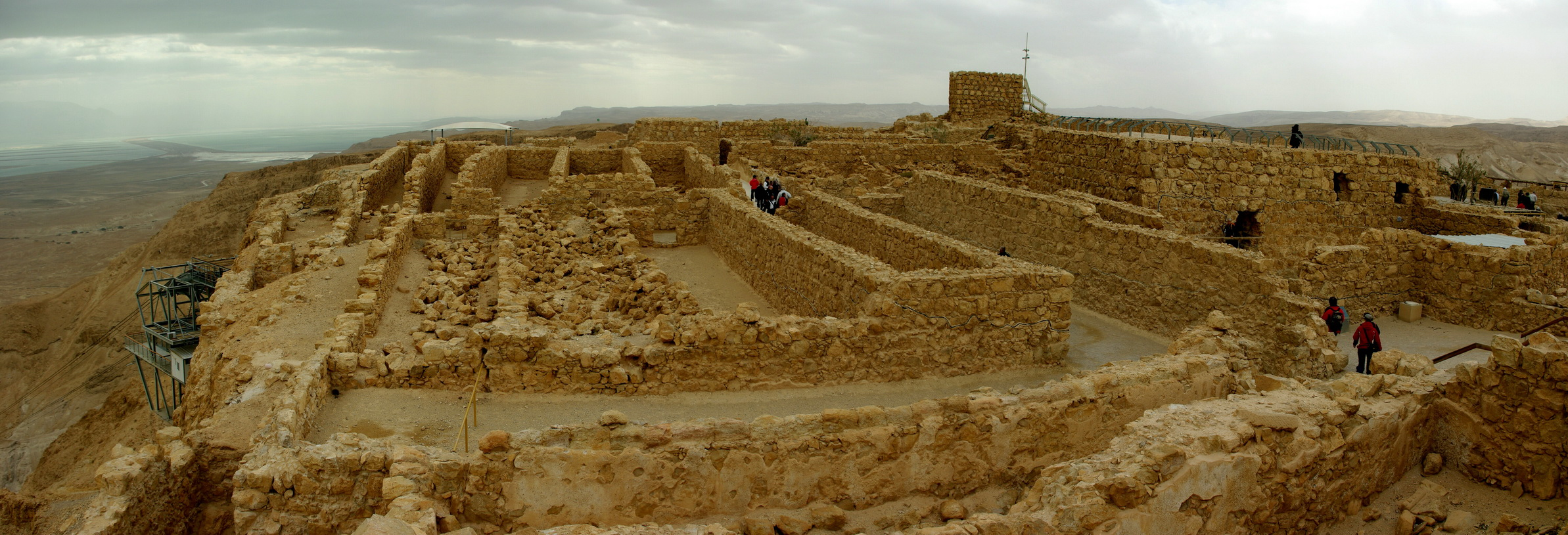 Panorama: Vorratshallen von Masada